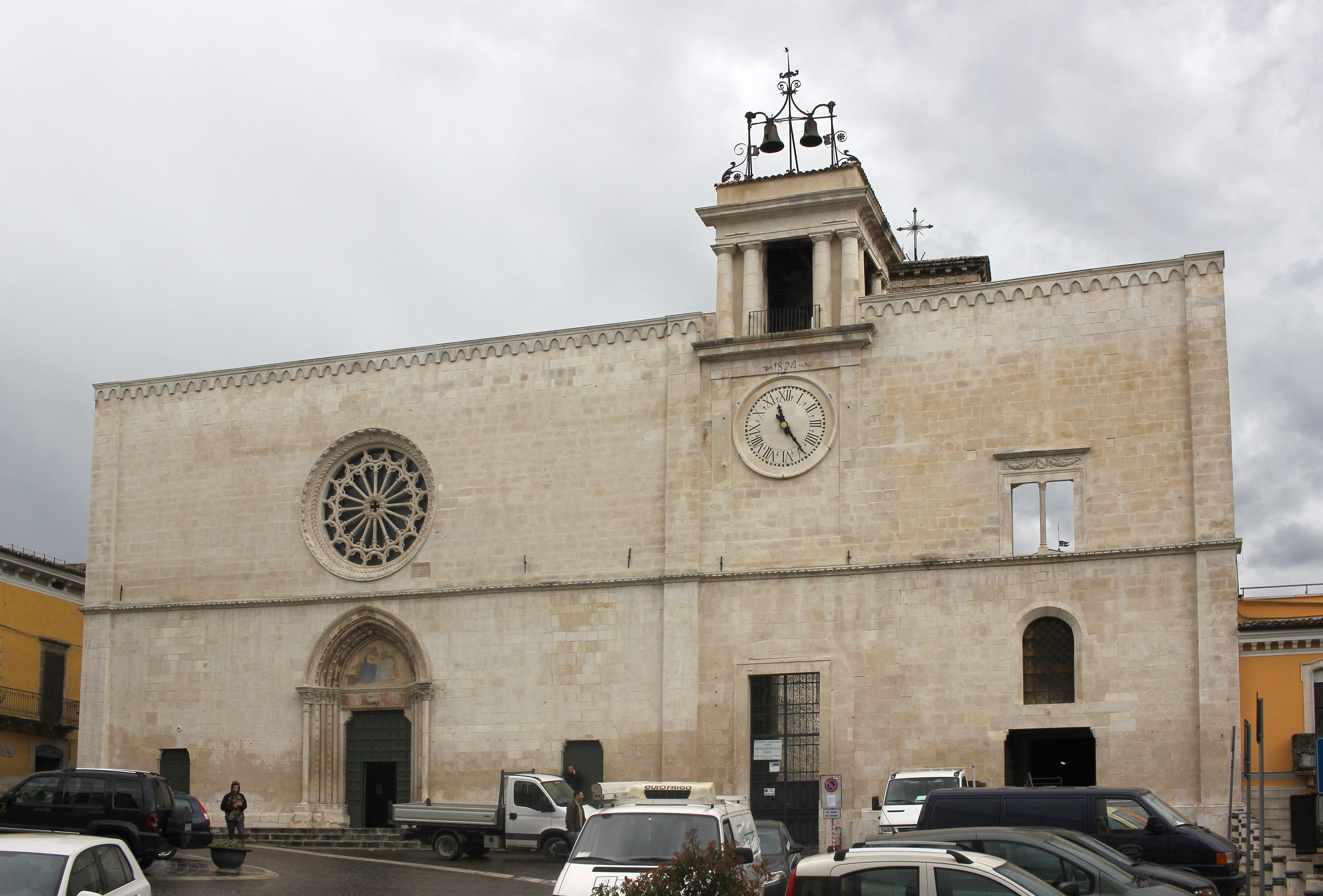 Santa Maria della Tomba in Sulmona